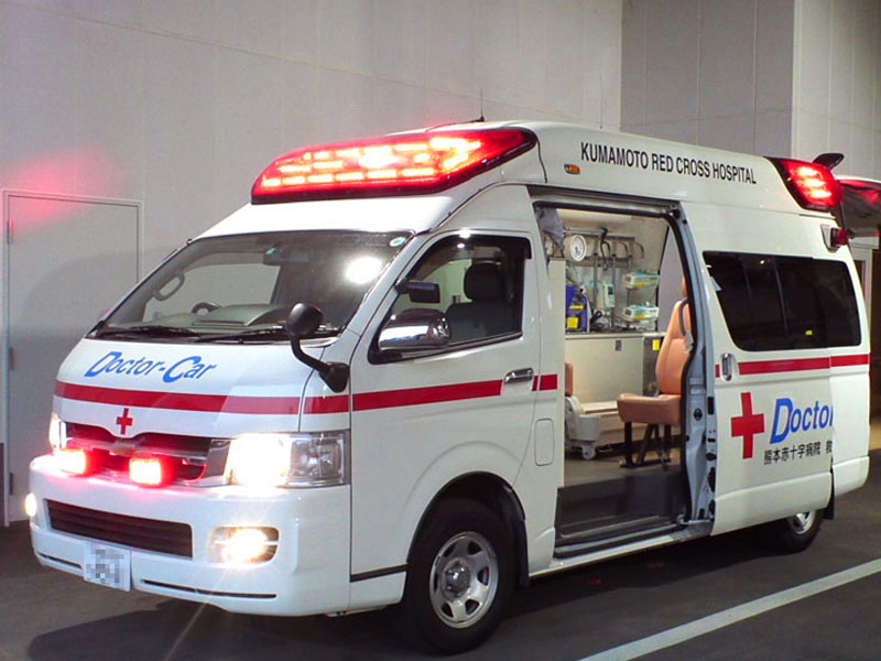 熊本赤十字病院 救命救急センターのドクターカー （救急車型）